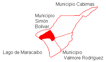 Ubicación de la Parroquia Alonso de Ojeda, Municipio Lagunillas, Zulia, Venezuela